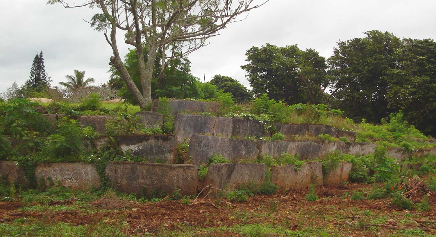 Langi Tauʻatonga; ancient royal burial mound in Lapaha, Tonga